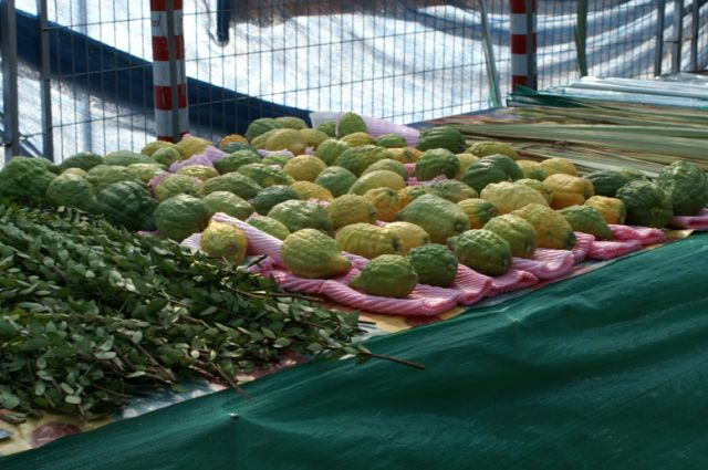 Etrog_Lulav_and_Hadas